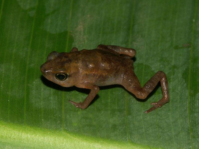 Didynamipus sjostedti